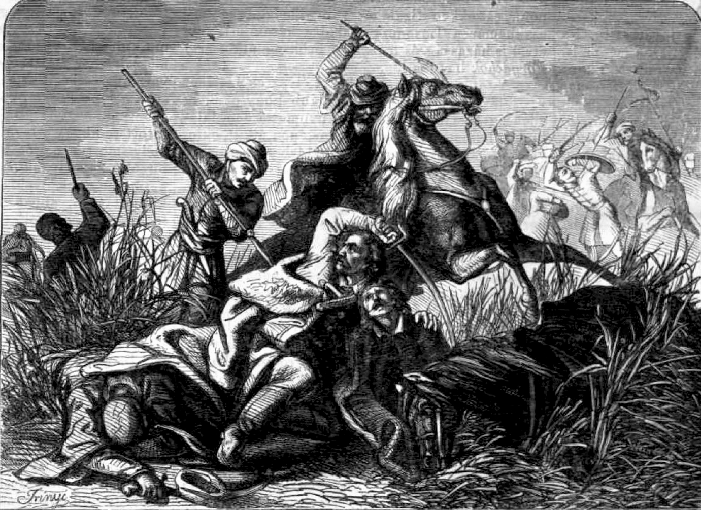 "1571-ben kanizsai kapitány volt Thury György. Incselkedő török csapat a vár alá szemtelenkedett. Ő is kiront rögtön néhányad-magával megfékezésökre; hanem akkor minden oldalról előtörtek, a kik elbújva voltak, és lenyomva sokan az egyet, könyörtelenül megölték. Fejét aztán nagy diadallal küldöttek Konstantinápolyba. Valami értéktelen fejet nem küldtek volna el. Ezzel is kimutatták, mennyire féltek tőle, a mig élt. Thury György valóban a XVI-dik század Kinizsijének nevezhető, annyira kiváló tulajdonai voltak a merészség és személyes vitézség, és anynyit ártott egymagában a töröknek." (Forrás: Vasárnapi Ujság 15. évf. 19. sz. (1868. máj. 10.))